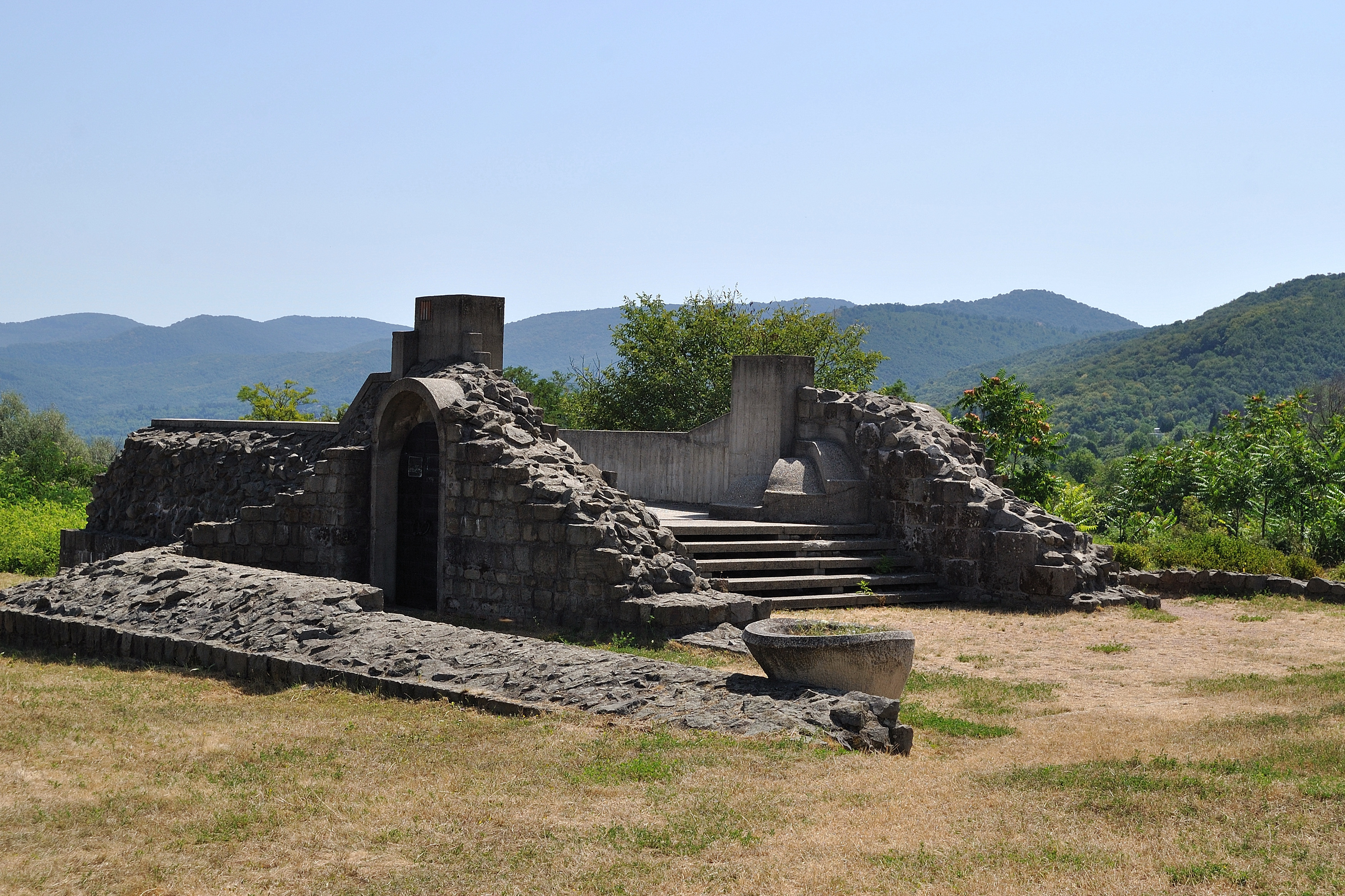 prépostsági romok This is a photo of a monument in Hungary. Identifier: 6144